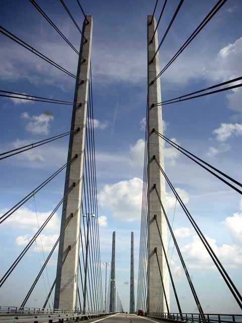 Die Öresund Brücke vom Auto aus betrachtet, 28.8.2004